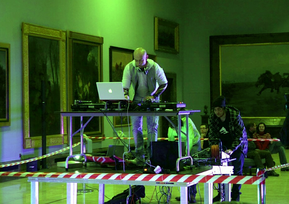 Tigermaan podczas występu w Sukiennicach na wydarzeniu o nazwie Chopin w Muzeum - Wariacje na 4 ręce. "Pojedynek" DJ vs Muzyk klasyczny wewnątrz Galerii Sztuki Polskiej XIX w Krakowie.